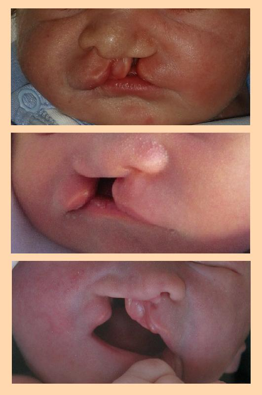 před operací